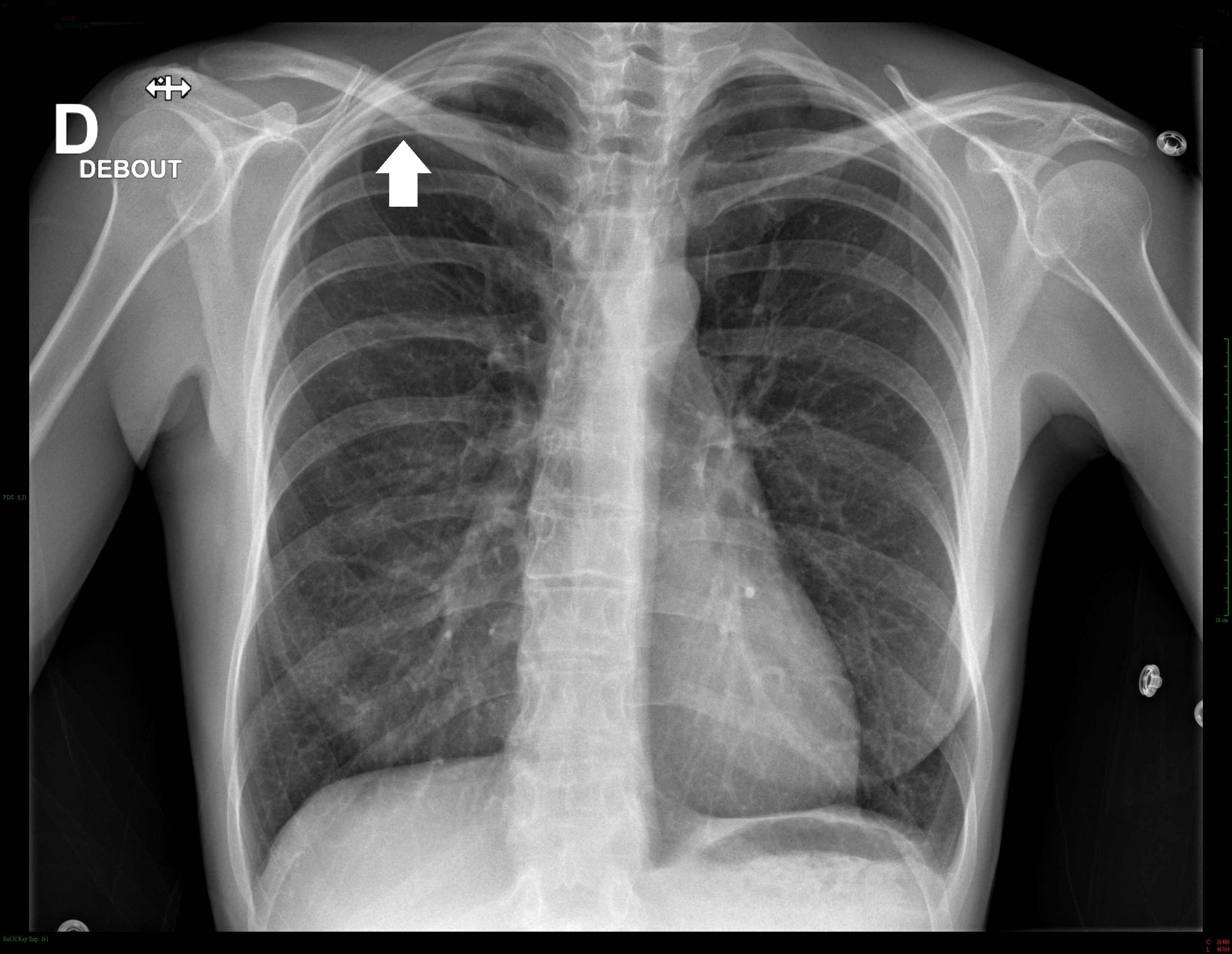 La tumeur est visible comme un épaississement au sommet du thorax. La superposition de la clavicule et de la première côte gène l'analyse.